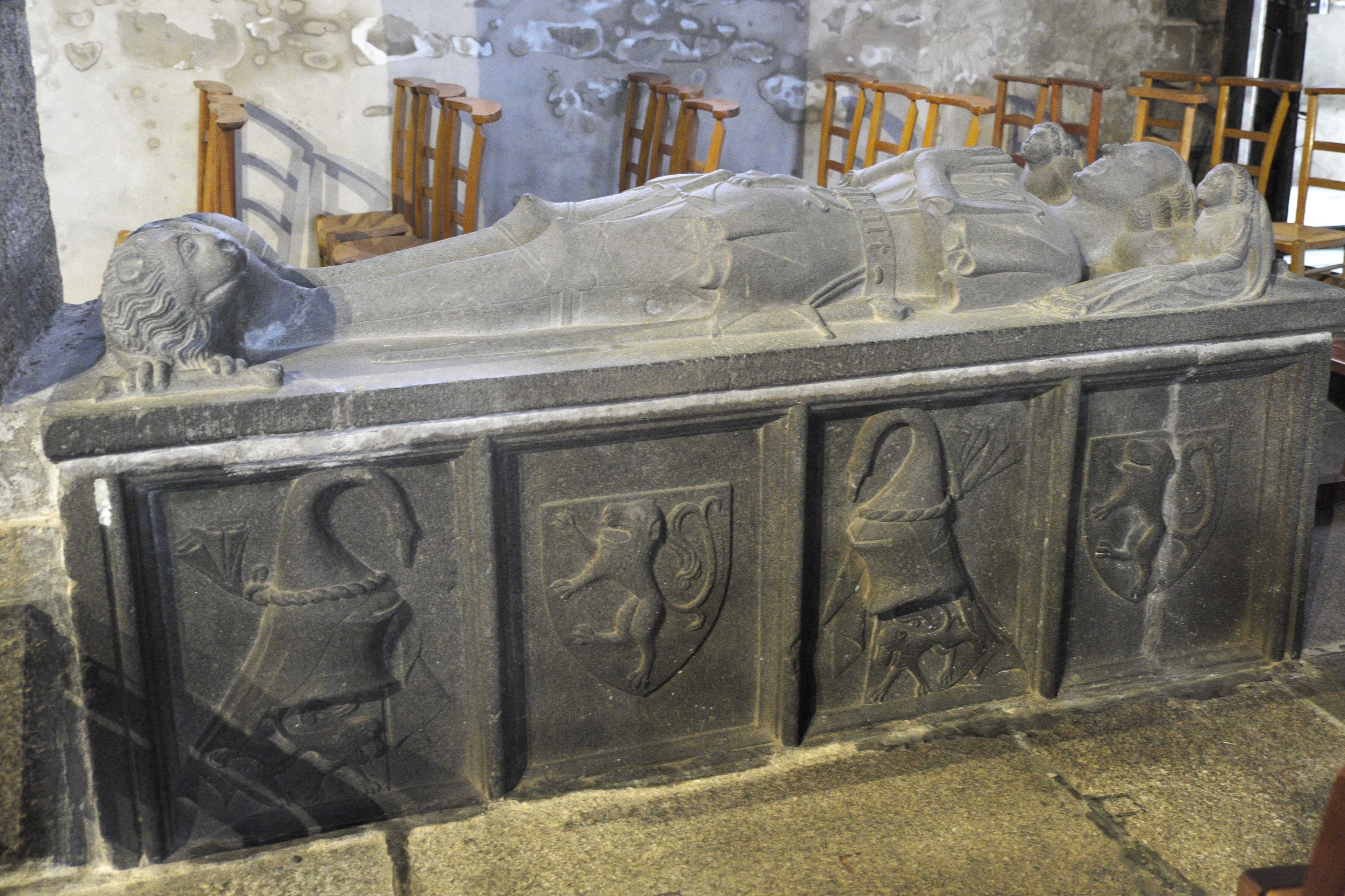 Katholische Pfarrkirche Saint-Pierre in Sibiril im Département Finistère (Region Bretagne/Frankreich), Hochgrab von Jean de Kerouzeré († um 1460) aus dem späten 15. Jahrhundert